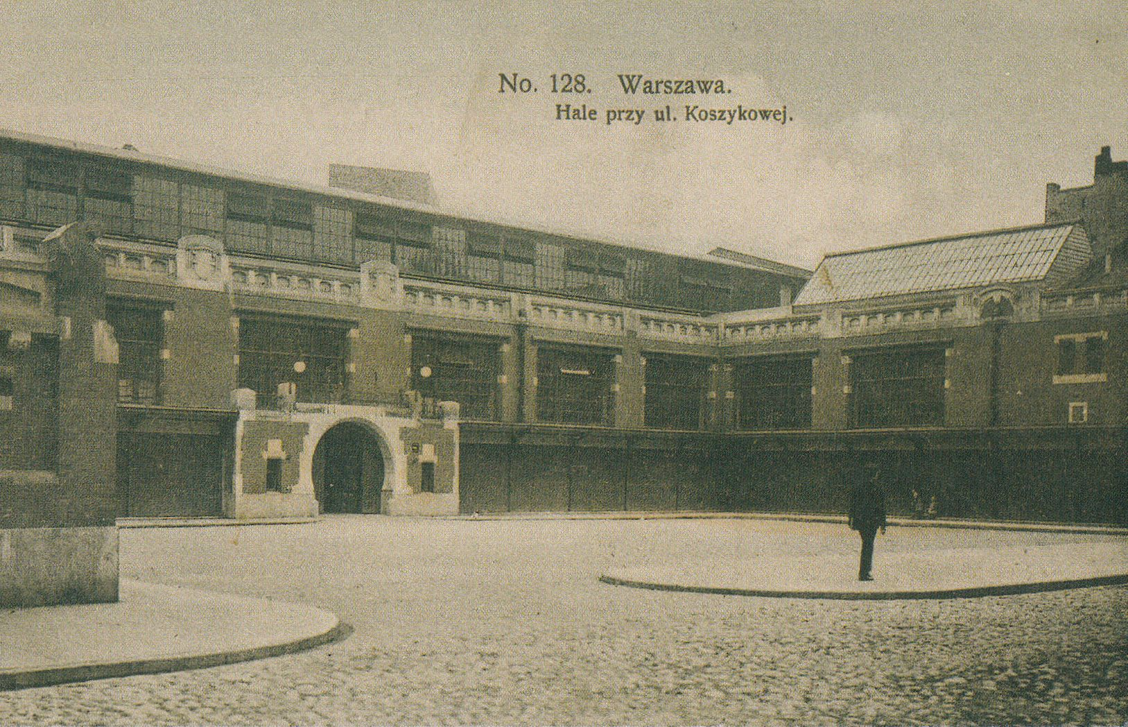 Hala Koszyki w Warszawie od strony. ul. Koszykowej